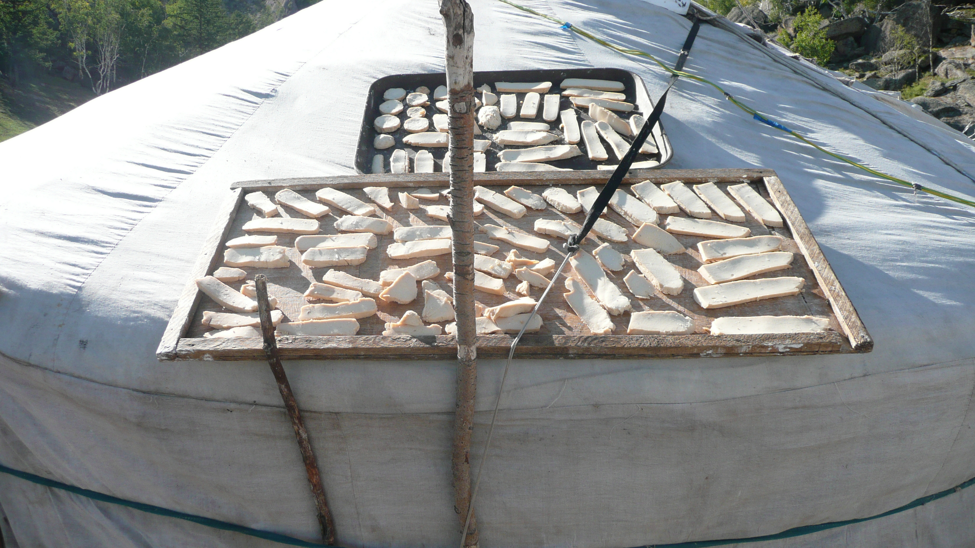 Aaruul